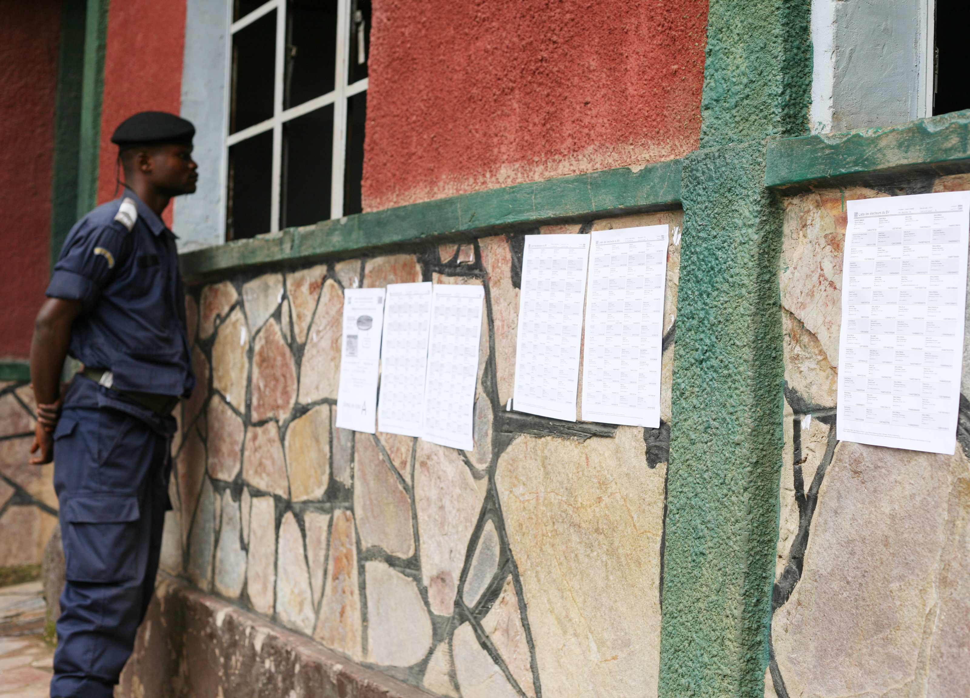 DSRSG Sarassoro’s Mission to Mbuji Mayi Saturday, 26 November 2011 Le Directeur de la DE MONUSCO Mathieu Bile, le Directeur adjoint de la DE a NYHQ A-Tadjoudine et le CNMPE Comité National de Médiation du Processus Electoral. Photo MONUSCO / Myriam Asmani